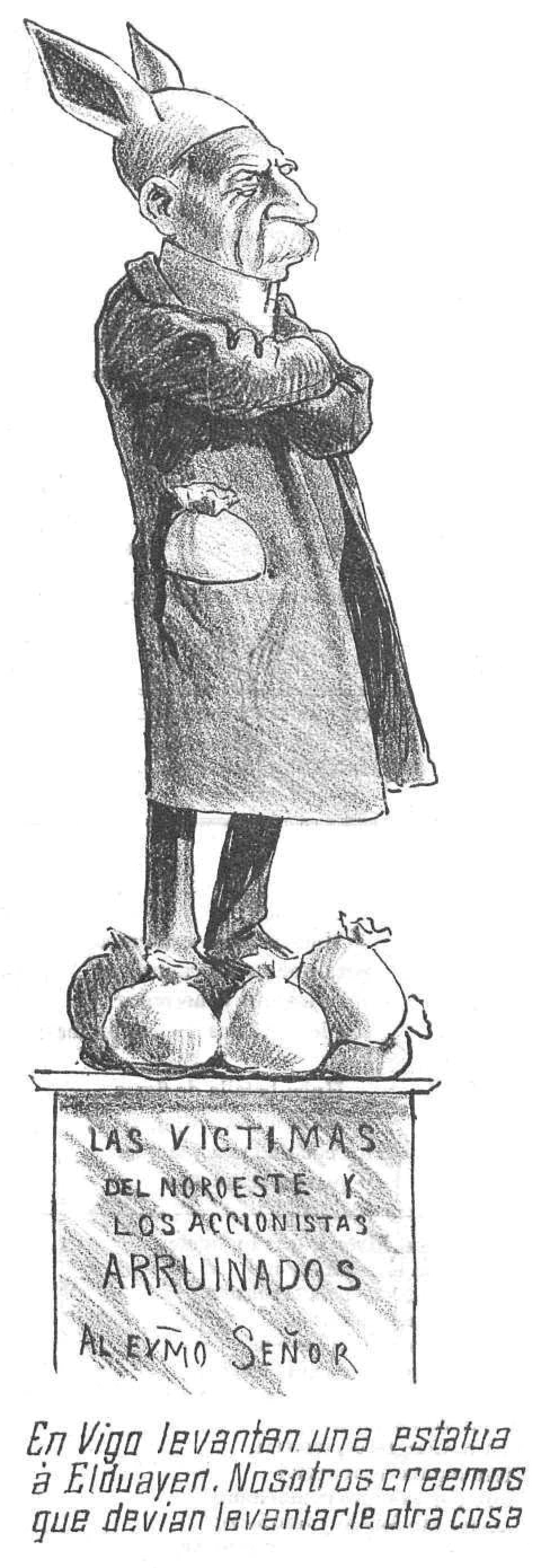 Las victimas del noroeste y los accionistas arruinados al Exmo. Señor En Vigo levantan una estatua á Elduayen. Nosotros creemos que devían levantarle otra cosa